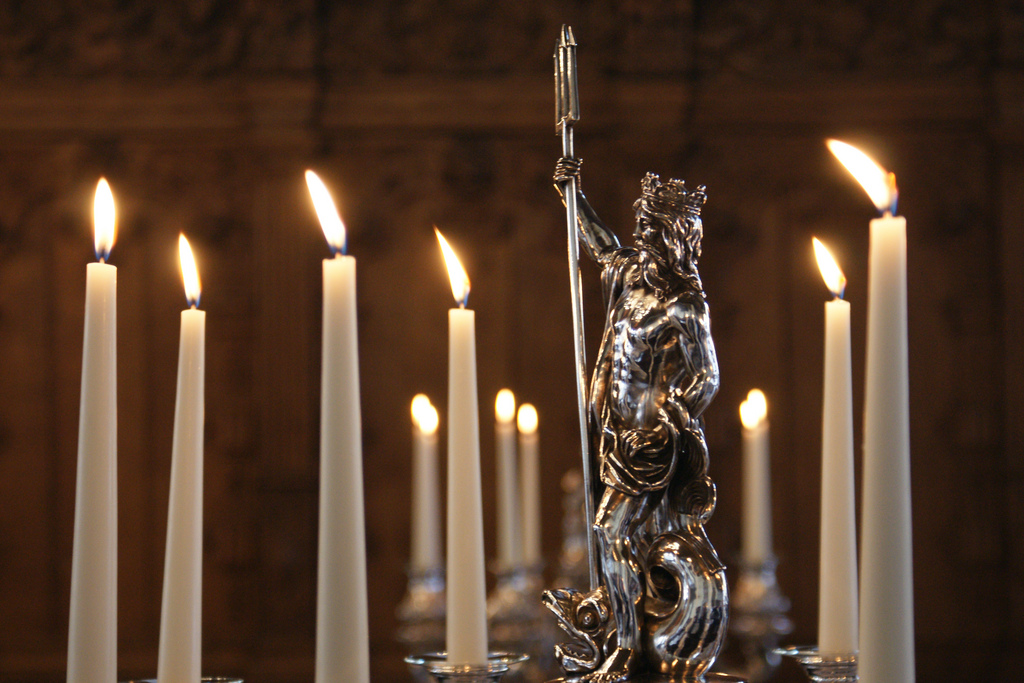 „Stimmungsbild“ von der 465. Schaffermahlzeit 2009 von Haus Seefahrt in der Oberen Rathaushalle des historischen Rathauses in Bremen, Deutschland: Brennende Kerzen bei einem der großen silbernen Kerzenleuchter, mit einer Neptunfigur als Leuchterverzierung (kurz vor dem Essen).